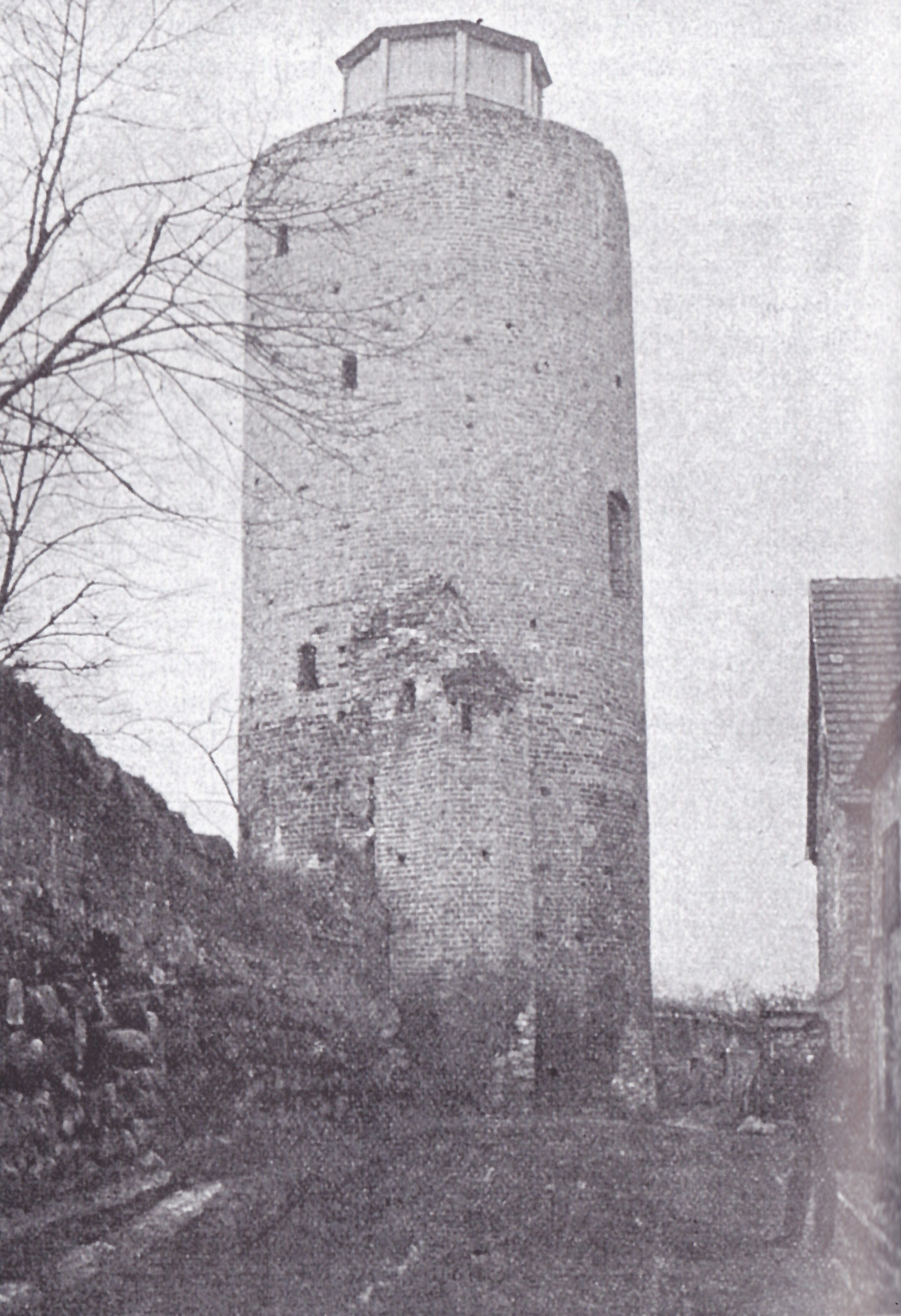 Pulverturm in Anklam mit Sternwarte 19. Jh